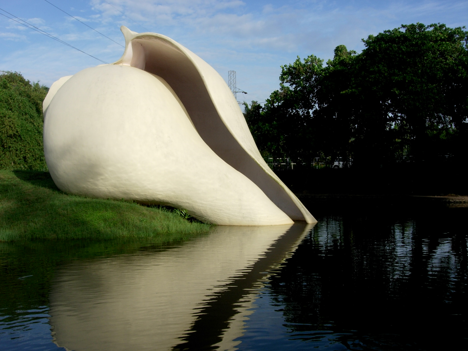 Sculpture in Aakulam, Trivandrum, India.